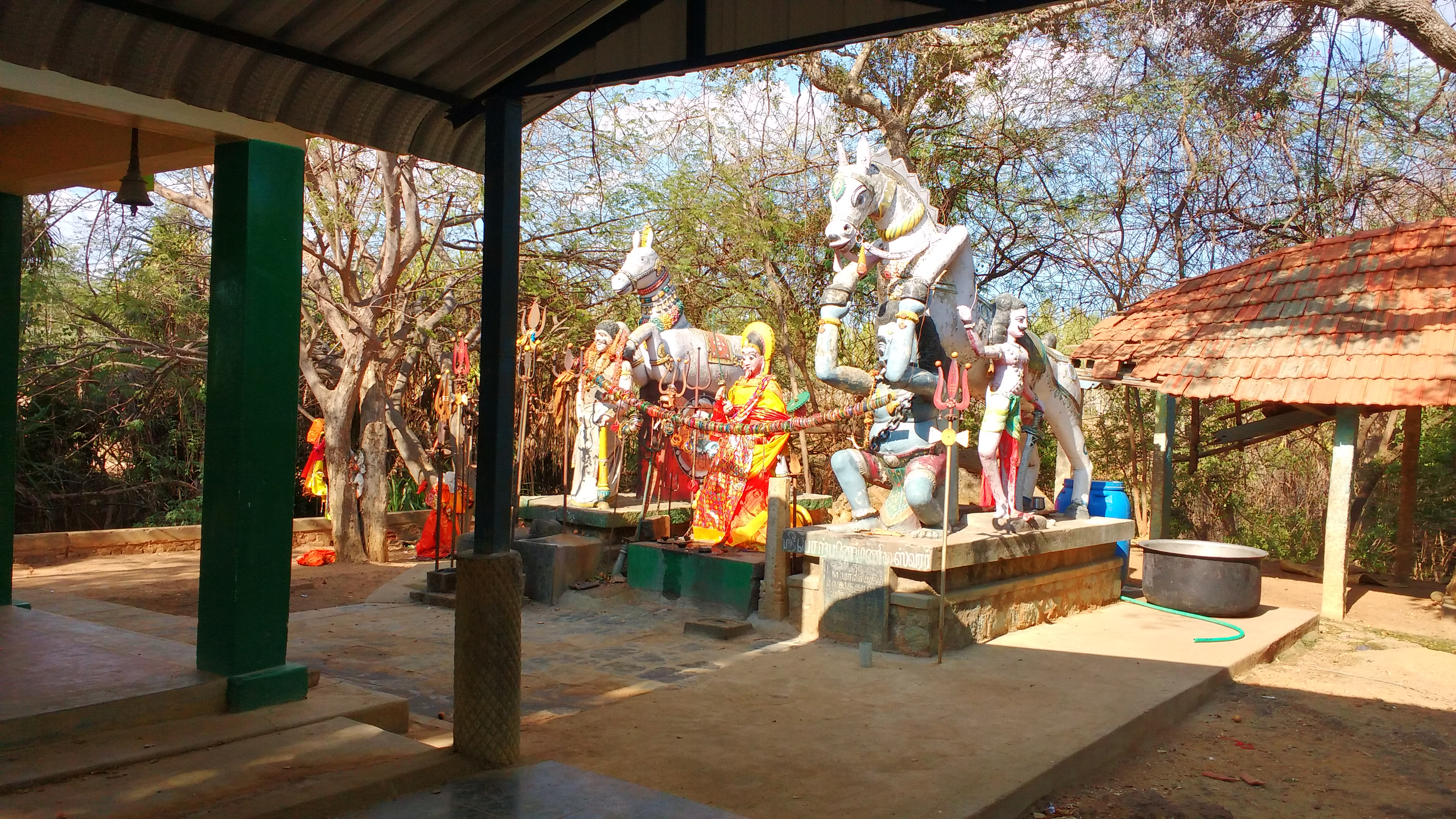 கீழக்கோட்டை ஆதி முனீஸ்வரர் ஆலயம்